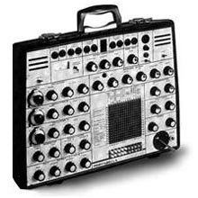 sintetizzatore EMS Synthi A Licensing Categoria:Sintetizzatori Categoria:Sintetizzatori EMS